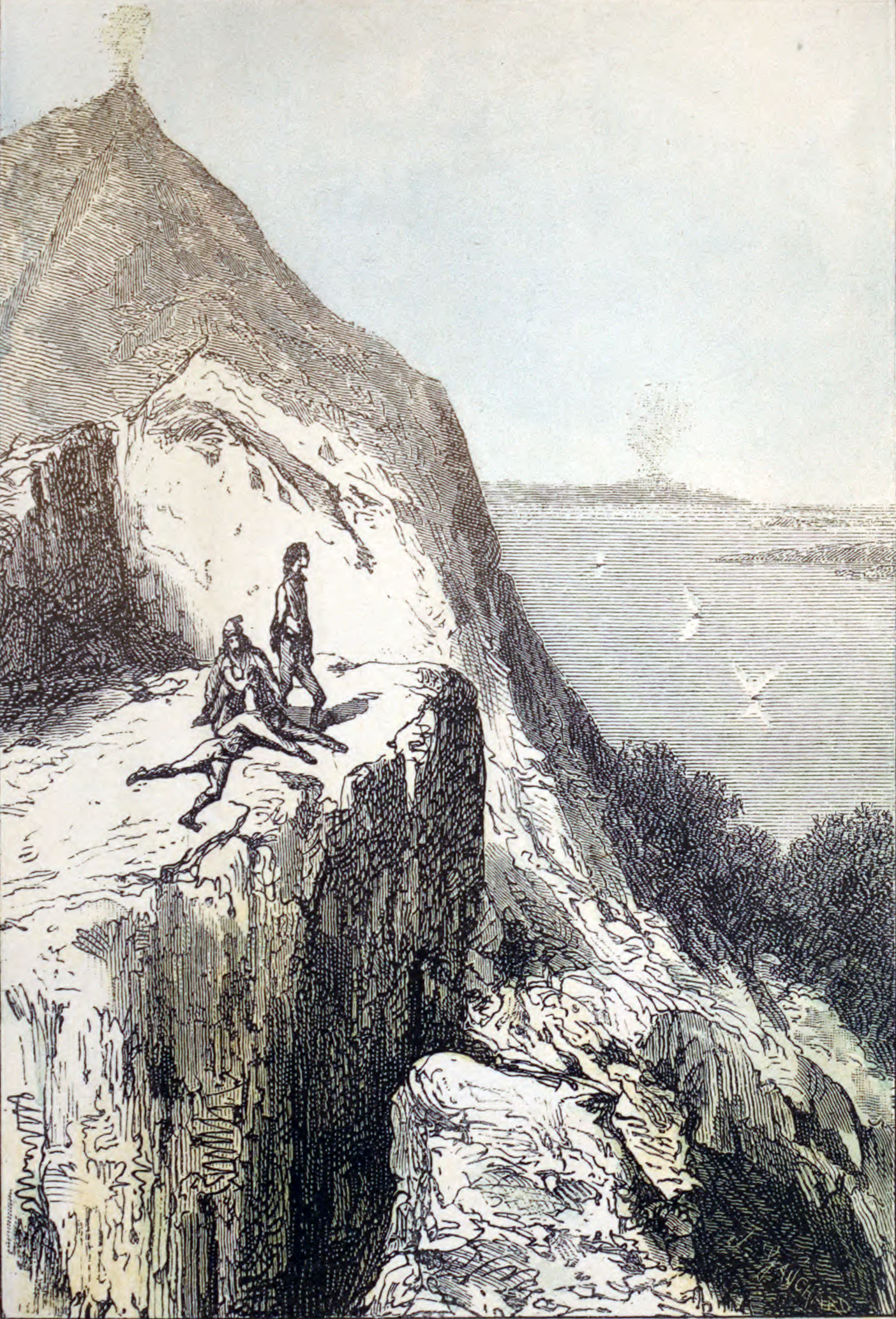 Voyage au centre de la terre